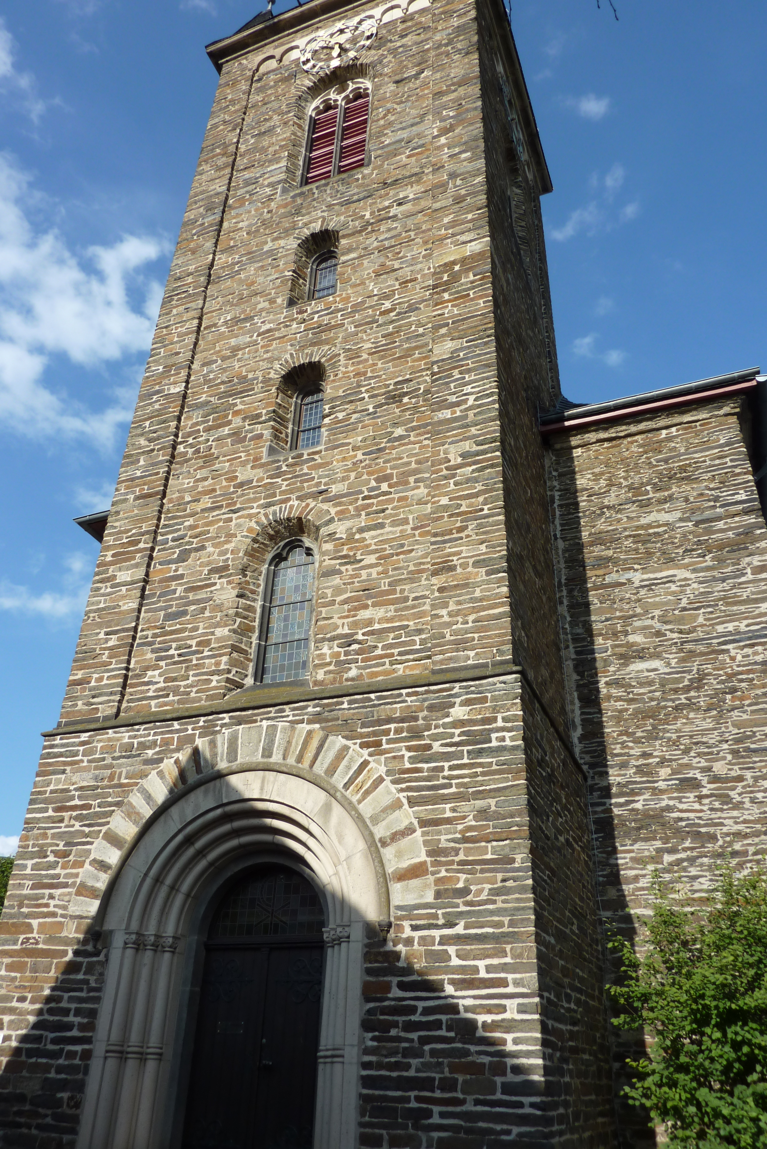 Portal und Turm der katholischen Kirche St. Johannes Apostel in Dernau